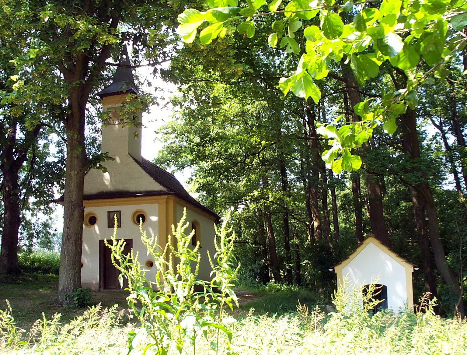 Pfaffenberg, Brünnlkapelle St. Anna. Erbaut Anfang 18. Jahrhundert; mit Ausstattung; Brunnenkapelle, 18. Jahrhundert